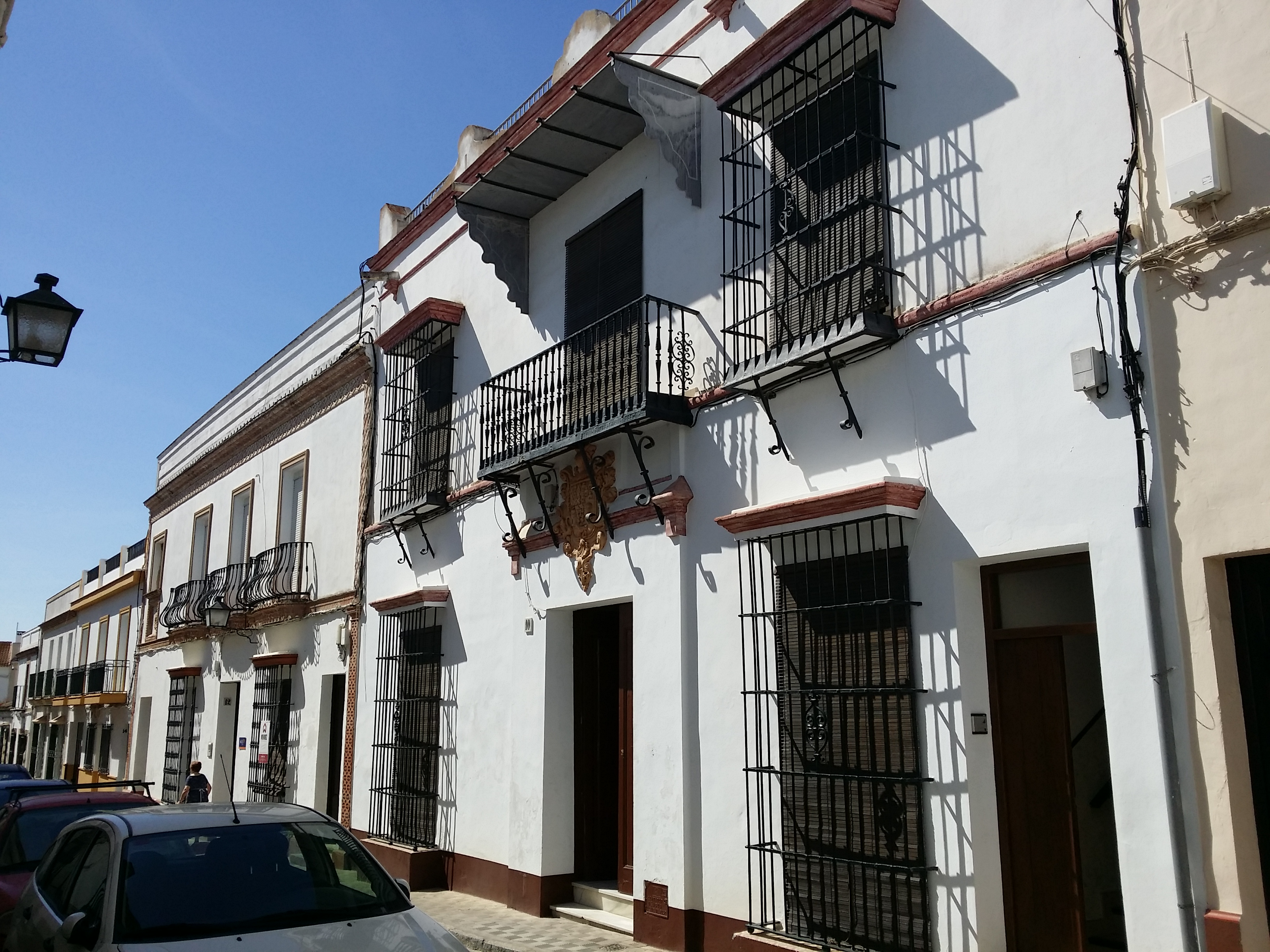 Fachada de la casa-palacio, del siglo XVI, de la familia Ruiz de Estrada y Prieto de Tovar, descendientes del navegante y descubridor del Perú, Bartolomé Ruiz de Estrada, uno de los trece de la fama que acompañó a Francisco Pizarro en el descubrimiento del Perú. También de su hijo Martín Yañez de Estrada, conquistador de tierra firme y provincia de Santa Marta.